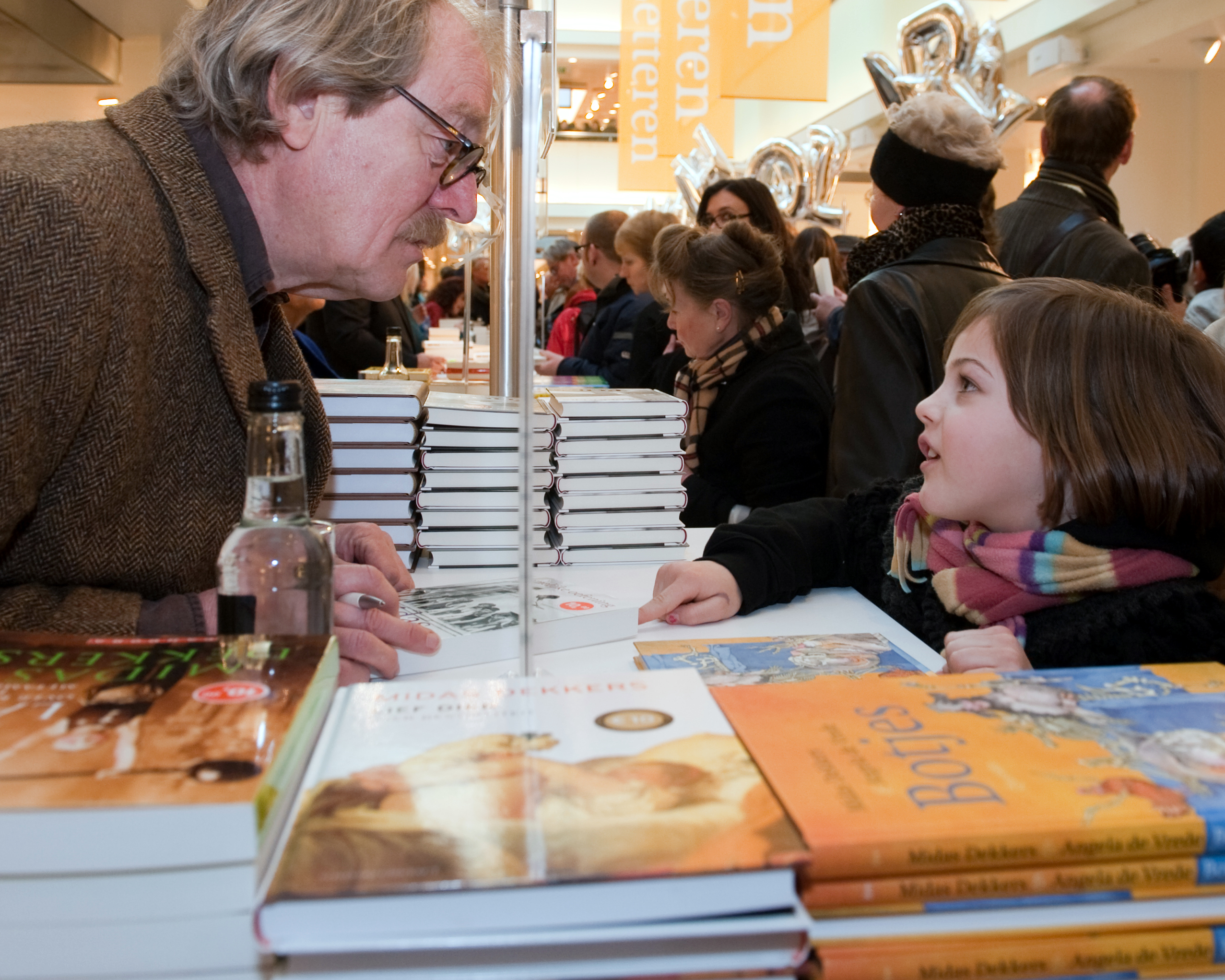 AMSTERDAM - Vlak voor de boekenweek organiseerde de Bijenkorf het feest der letteren. Deelnemende auteurs Bart Chabot - Beau van Erven Dorens – Cees Nooteboom – Charlotte Mutsaers – Eva Posthuma de Boer – Franca Treur – Hanneke Groenteman – Jaap Scholten – Jan Siebelink – Jules Deelder – Lulu Wang – Maarten ’t Hart – Marion Bloem – Marion Pauw – Marjan Berk – Midas Dekkers – Nico Dijkshoorn – Peter van Straaten – Remco Campert – Renate Dorrestein – Robert Vuijsje – Rosita Steenbeek – Simone van der Vlugt – Sophie van der Stap – Stine Jensen